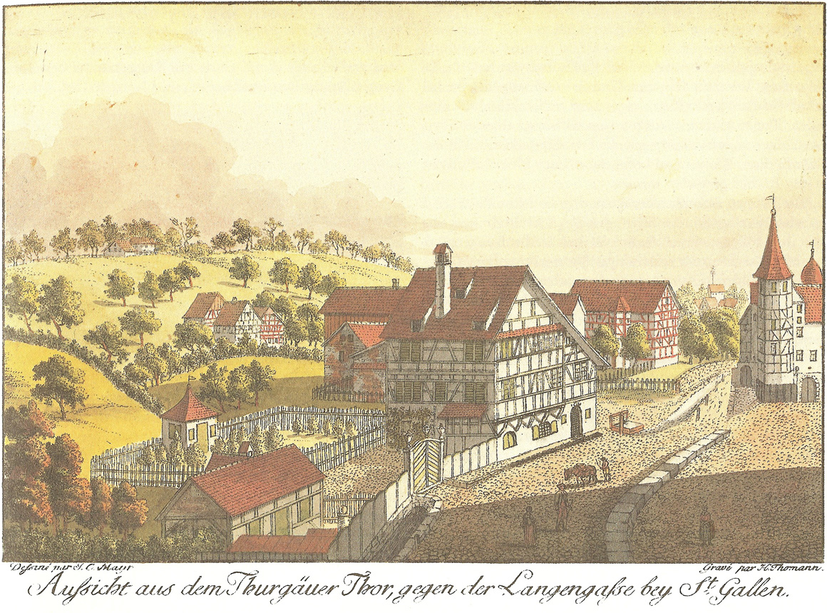 Aussicht aus dem Thurgäuer Thor, gegen der Langengaße bey St. Gallen (Originaltitel). Aussicht aus dem eigentlich eher unter dem Namen Platztor bekannten Stadttor Richtung St. Jakob-Strasse/Langgasse. Linkerhand wahrscheinlich die erste Brauerei der Stadt mit dem Wirtshaus «Schützengarten». Dieses und die gleichnamige Brauerei befindet sich noch immer dort (allerdings nicht das hier abgebildete Gebäude).